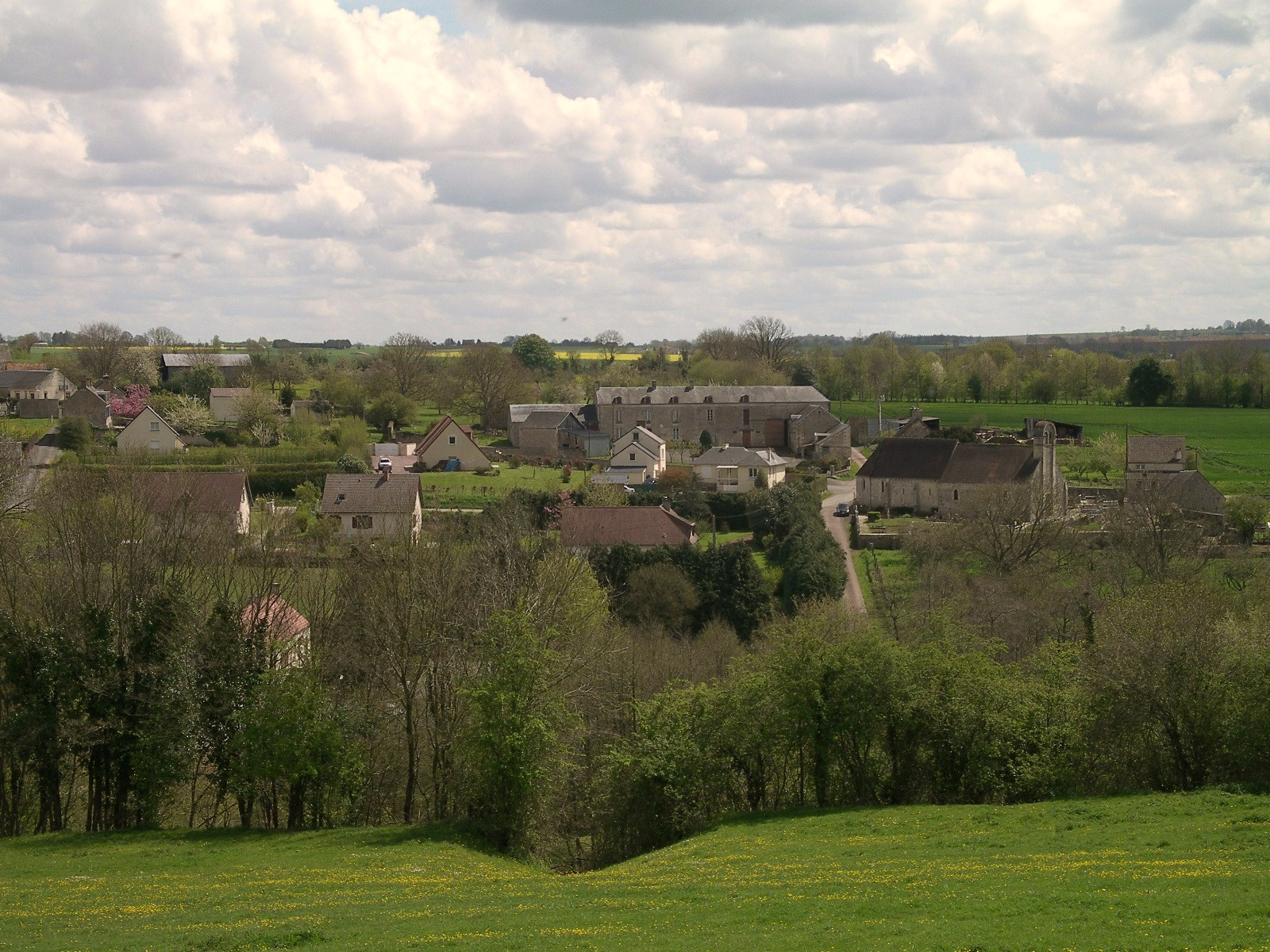 La commune d'Espins (Calvados)